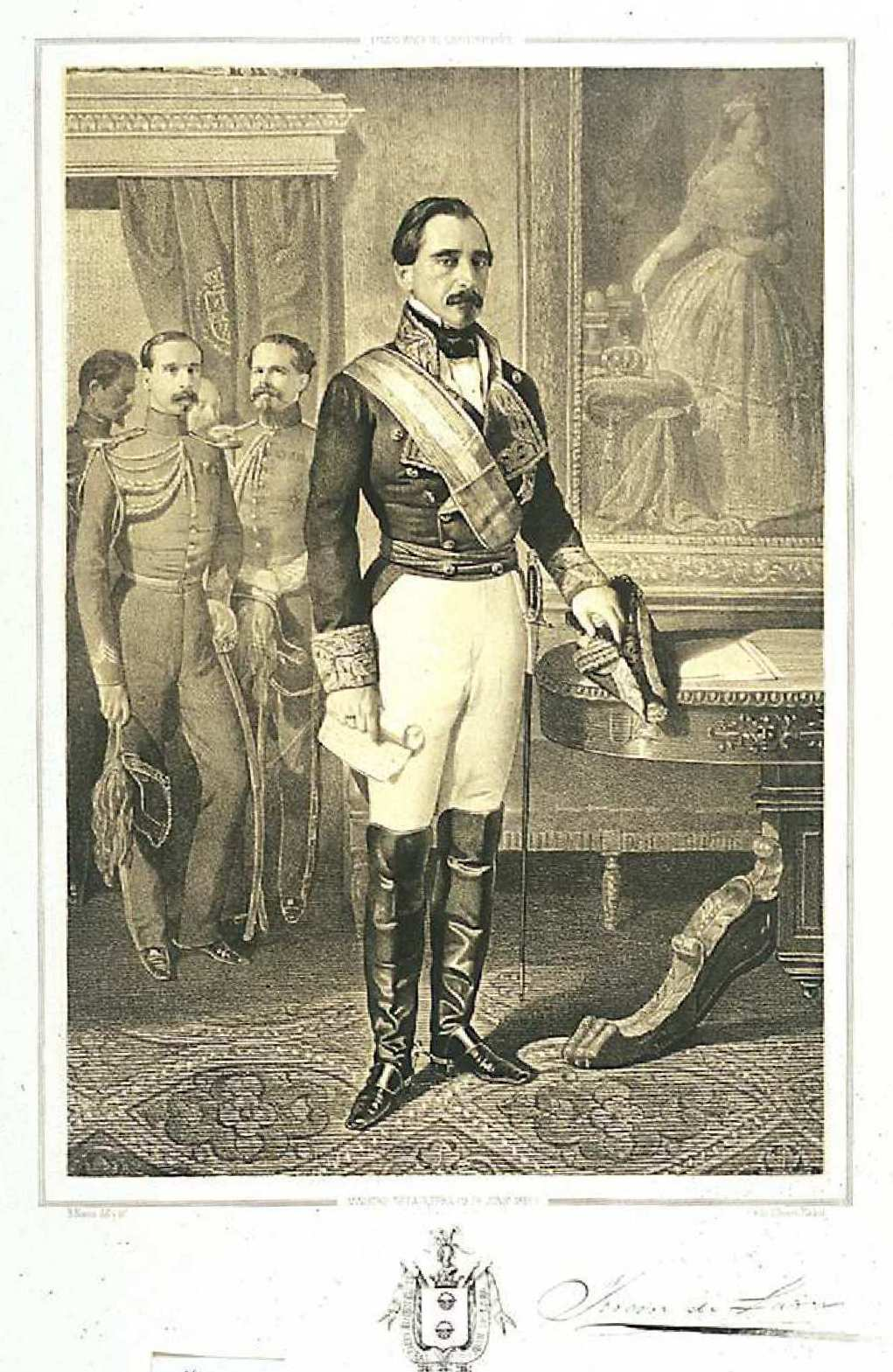 Juan de Lara Irigoyen, litografía de Bernardo Blanco y Pérez. Biblioteca Nacional de España.